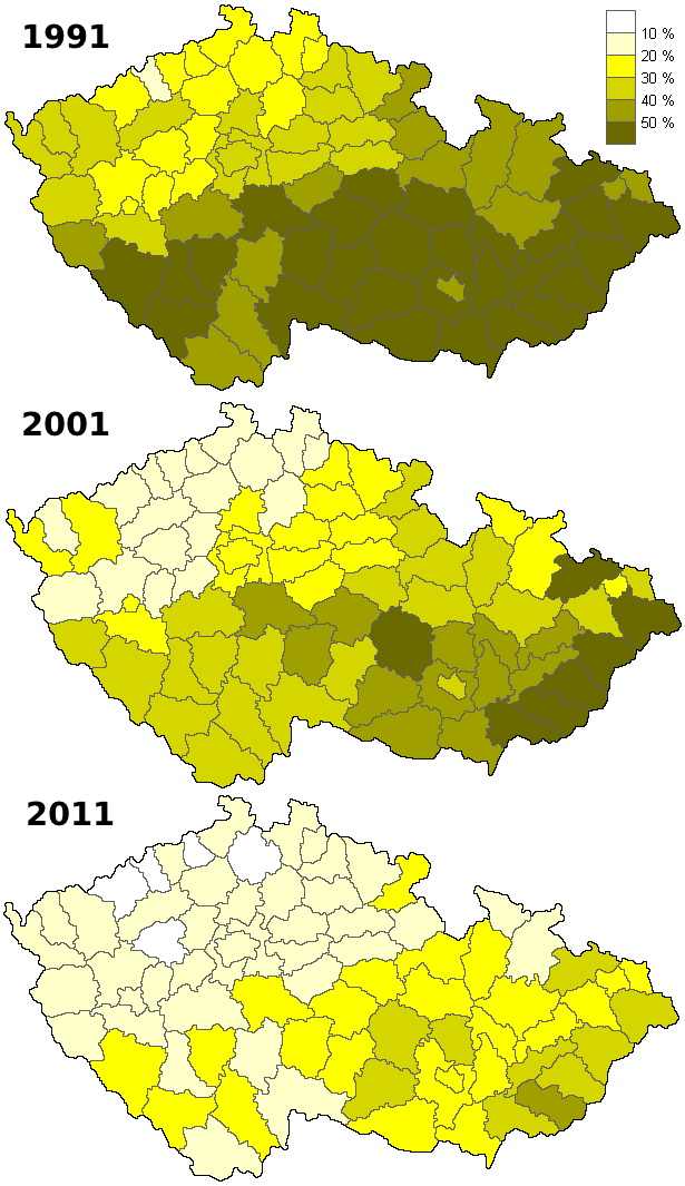 Podíl věřících obyvatel v okresech podle sčítání lidu z roku 2011